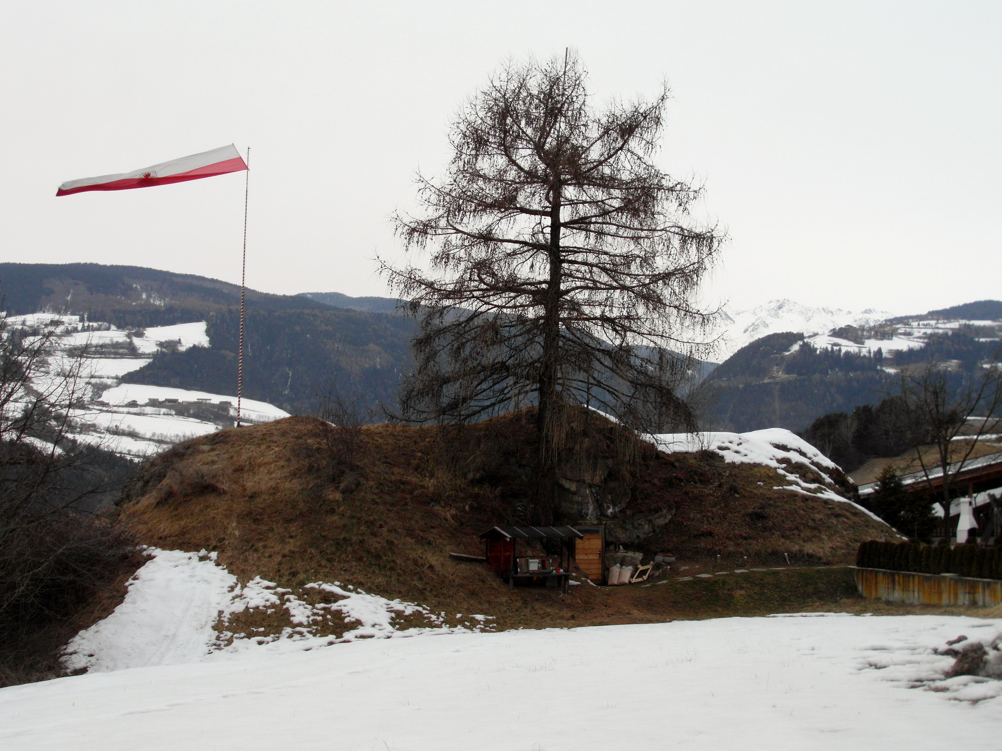 Opera 26 - Sbarramento Rienza-Rio Valles-Sciaves